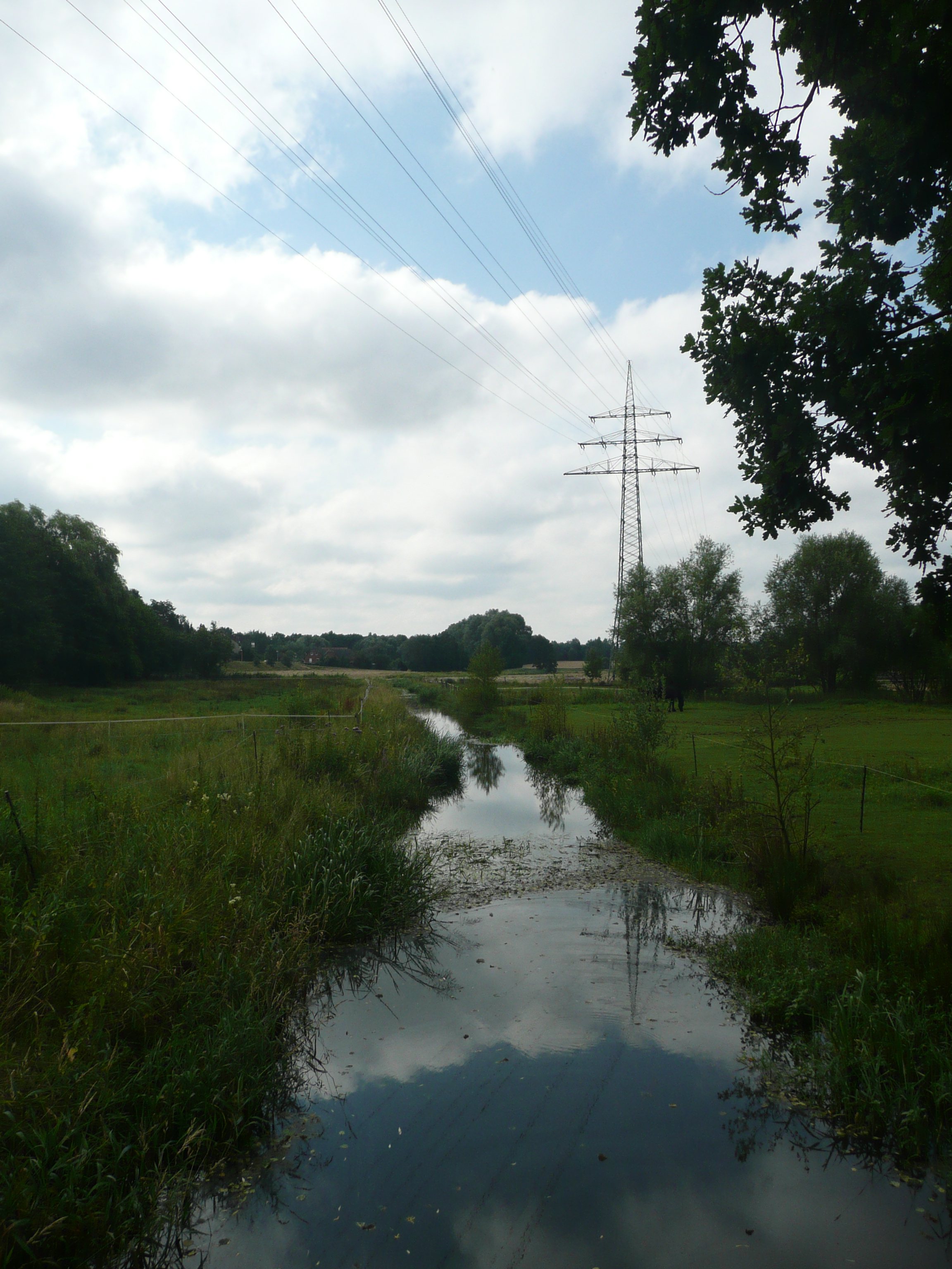 Hasenburger Mühlenbach von der Straße Im Dorf in Lüneburg-Oedeme; Blick ins Naturschutzgebiet „Hasenburger Bachtal“